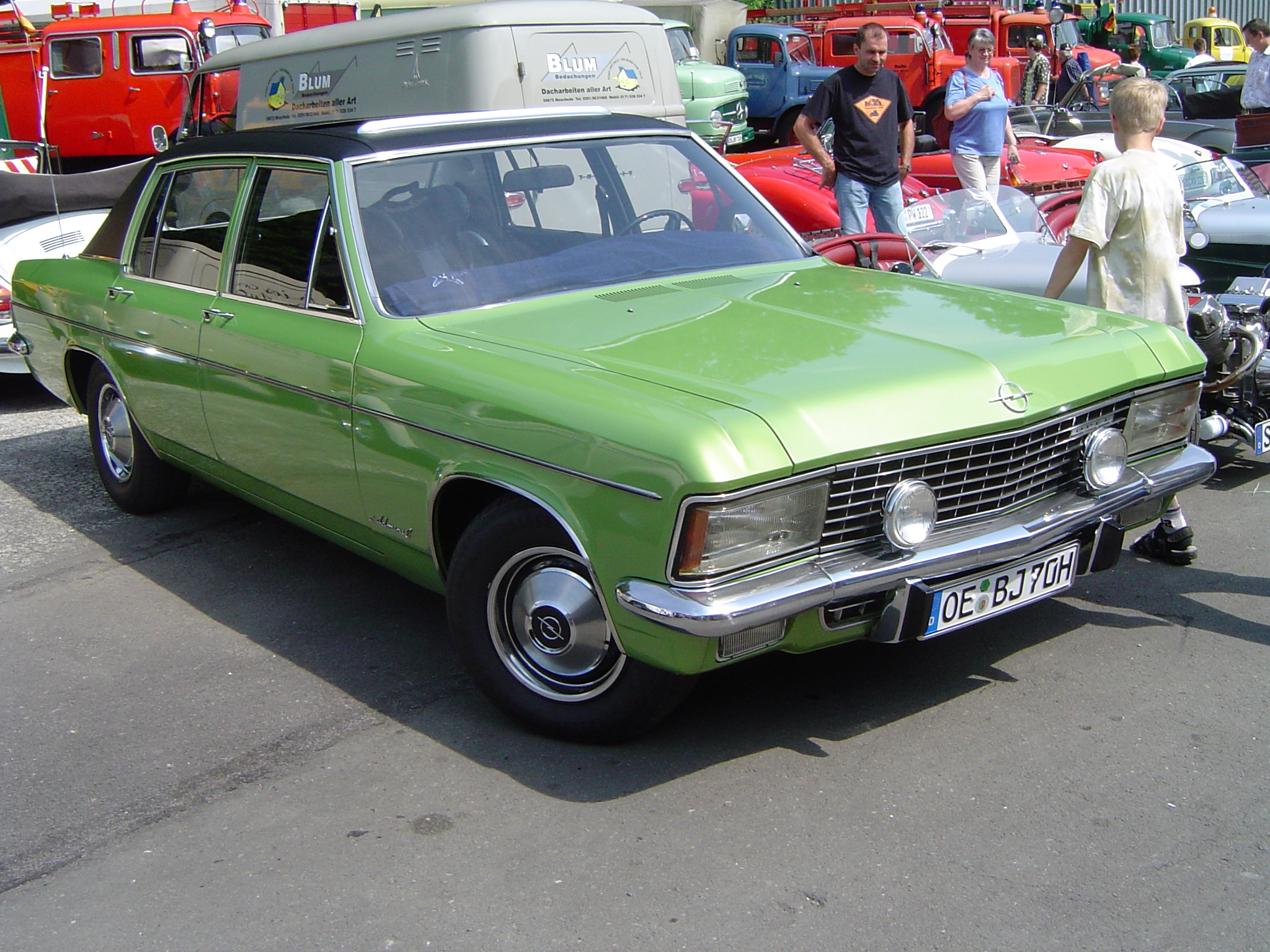 Oldtimertag - Flugplatz Meschede Schüren